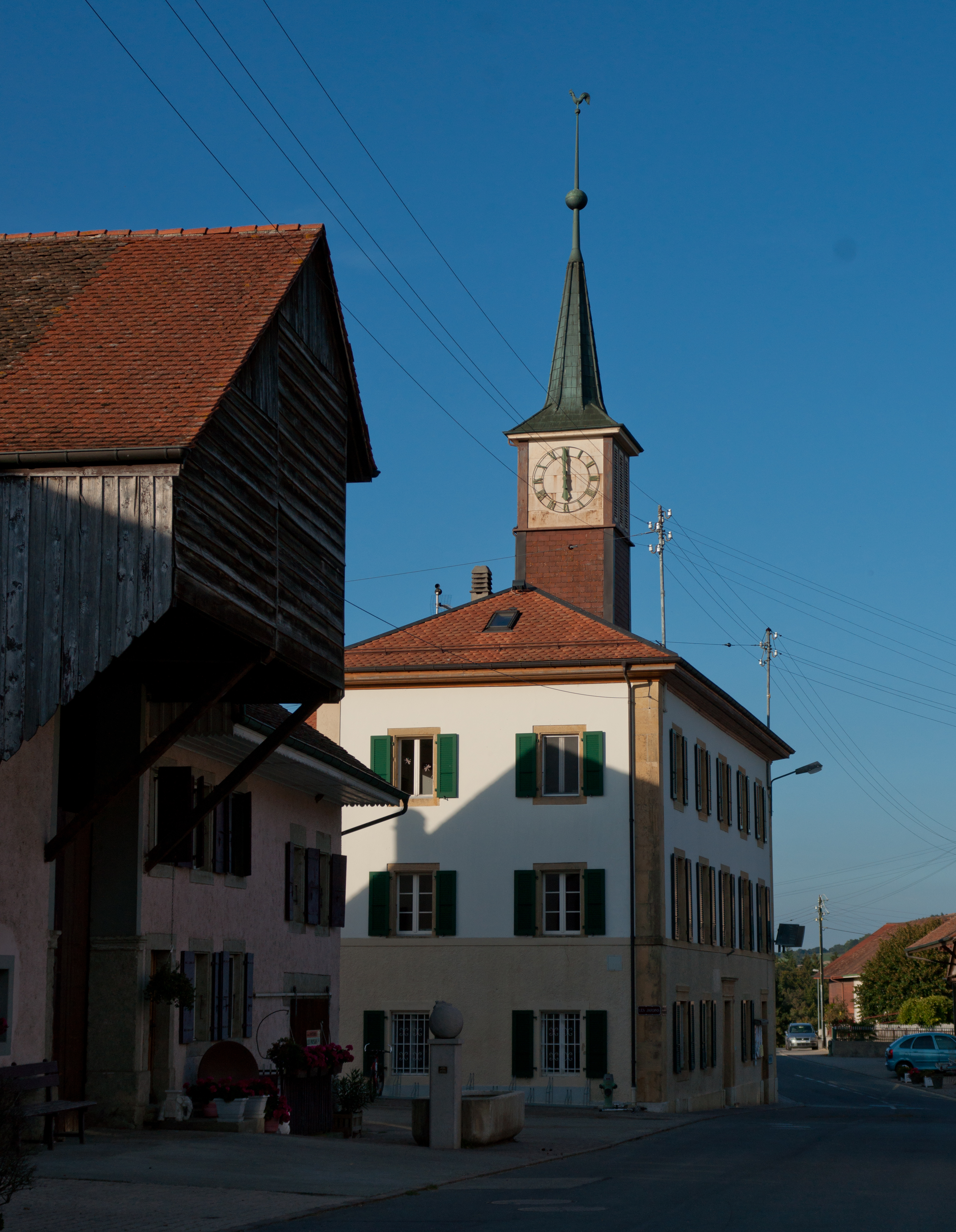 Maison de commune de Valeyres-sous-Ursins, canton de Vaud, Suisse.